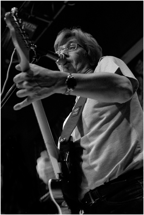 Константин Никольский. Концертный портрет в чб